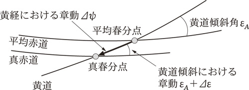 歳差だけでなく章動の影響も考慮した春分点、赤道を「真春分点」「真赤道」と呼ぶ。